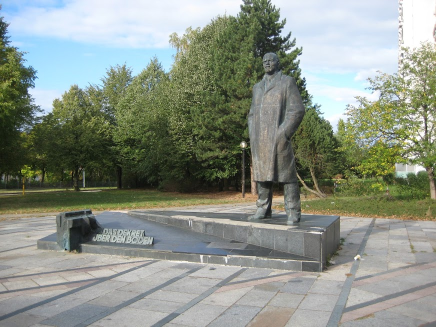 Denkmal Lenins in der Hamburger Allee